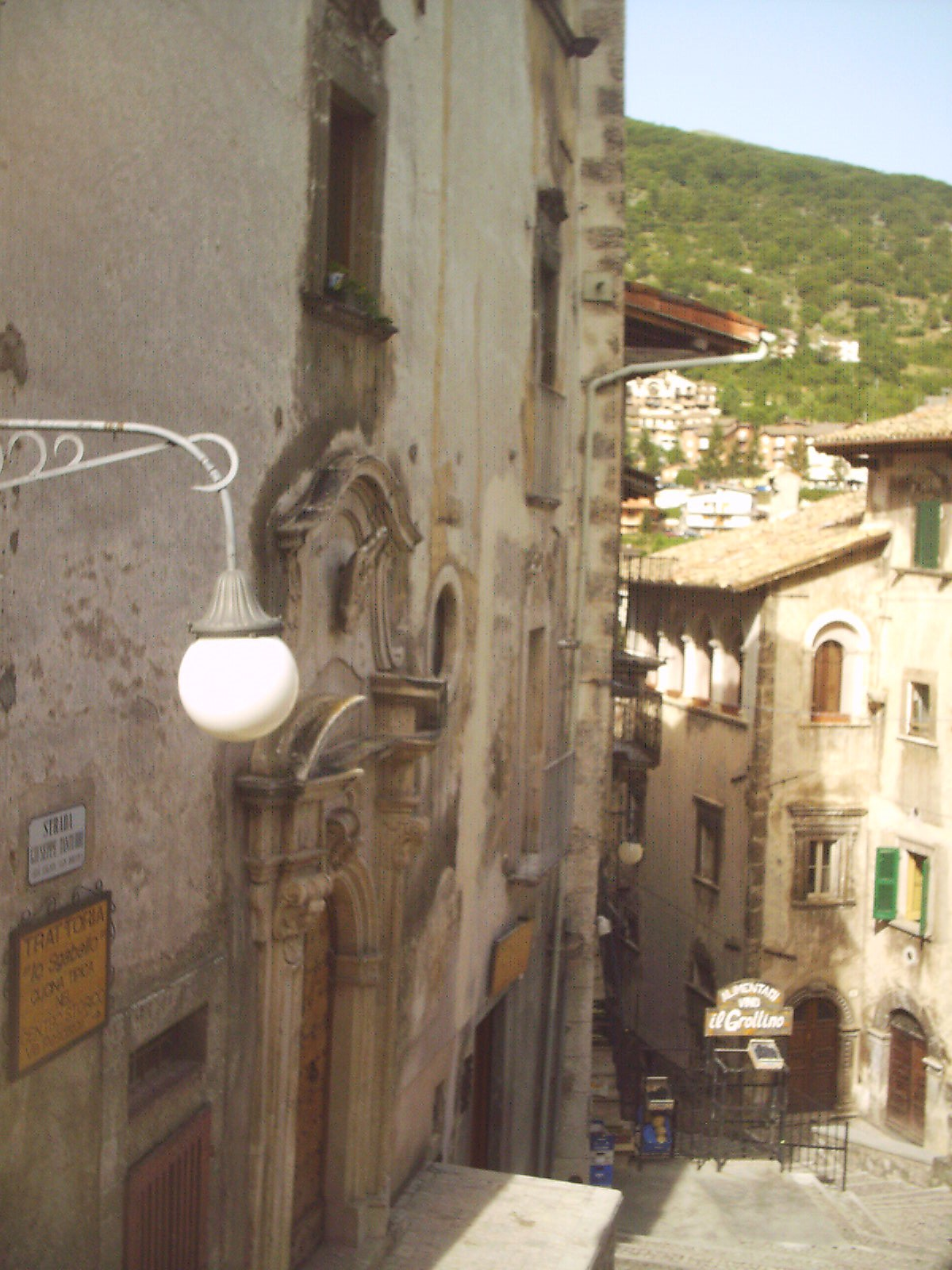 Portale di Palazzo Mosca (Scanno, provincia dell'Aquila)